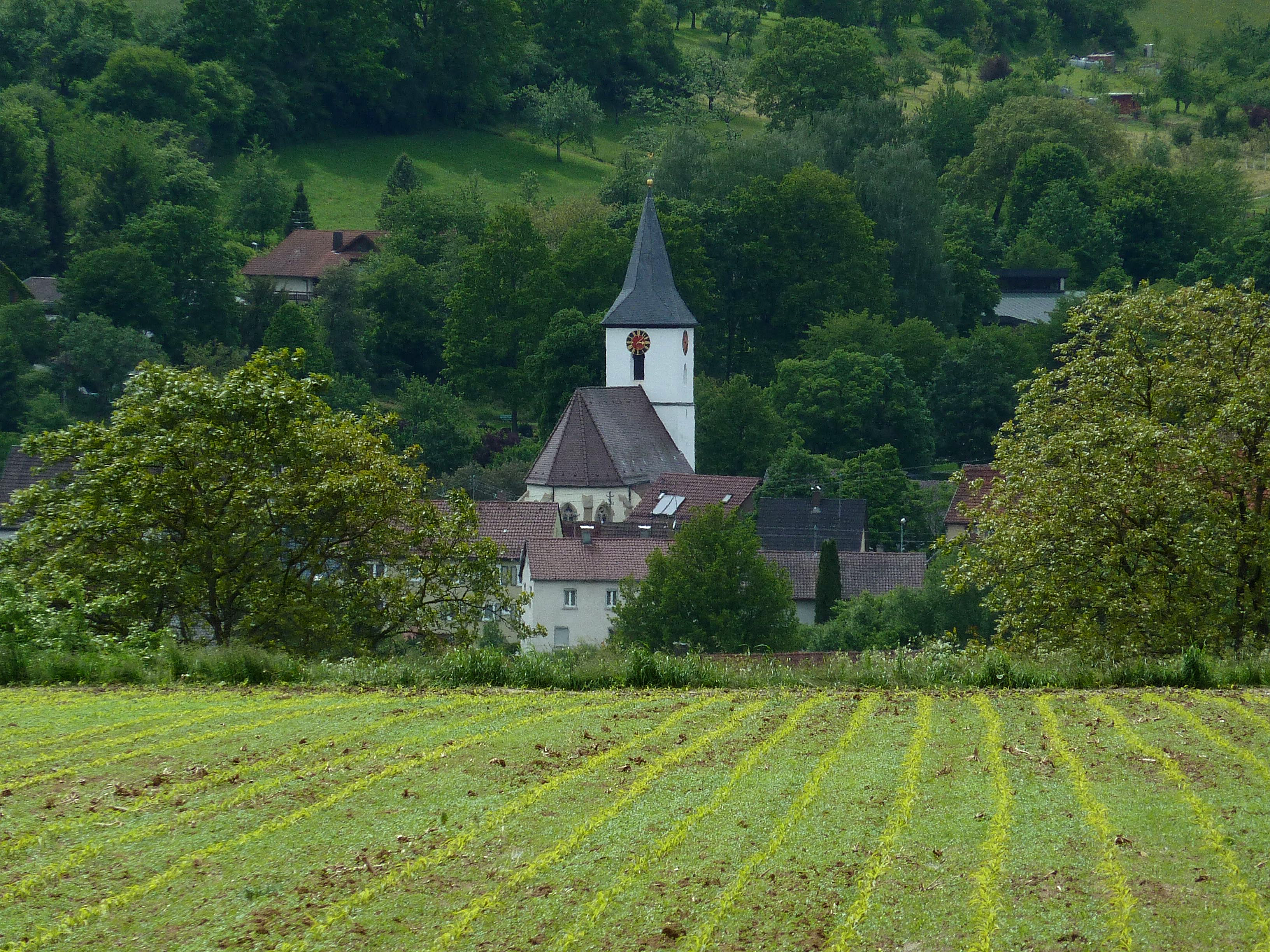 Kirche von Albershausen Kreis Göppingen